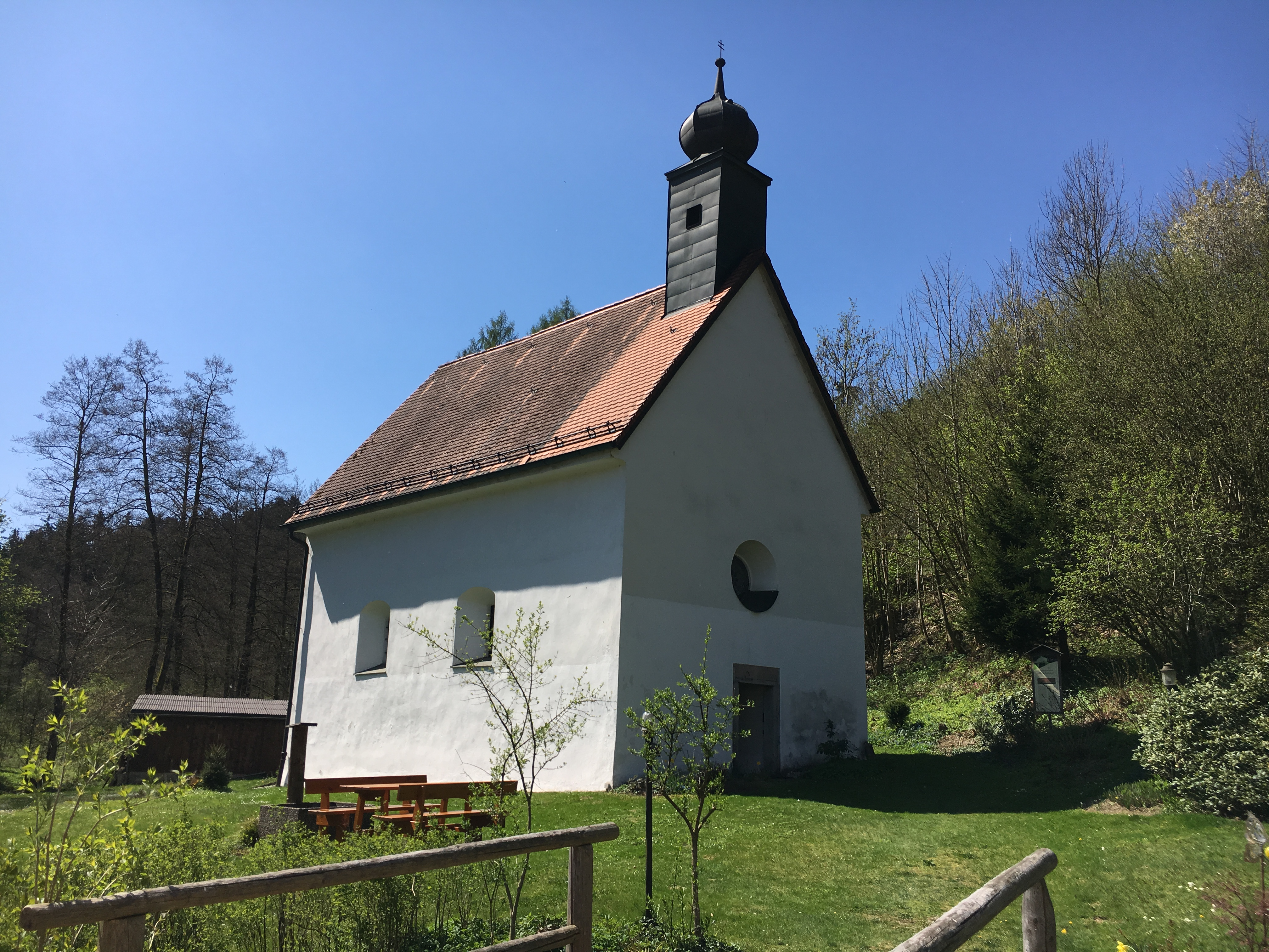 Die Kapelle Maria Einsiedeln ist ein kleines Kirchlein, etwa zwei Kilometer südlich von Neukirchen vorm Wald in der Ortschaft Geiermühle. Die Kapelle Maria Einsiedeln ist im Jahr 1641 von Stefan Geier gebaut worden – nach dem Vorbild der weltberühmten „von Gott geweihten Kapelle Maria Einsiedeln” in der Schweiz. Um ihren Bau rankt sich eine Sage, an die auch die über dem Sturz der Kapelle zu sehenden Fingerabdrücke erinnern. Quelle